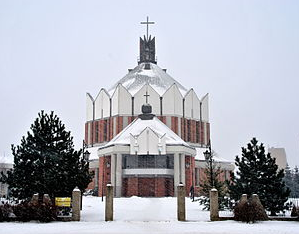 Eglise Saint Radzym Gaudenty